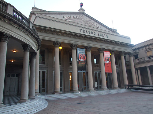 Teatro Solís de Montevideo, tras las obras de mantenimiento.